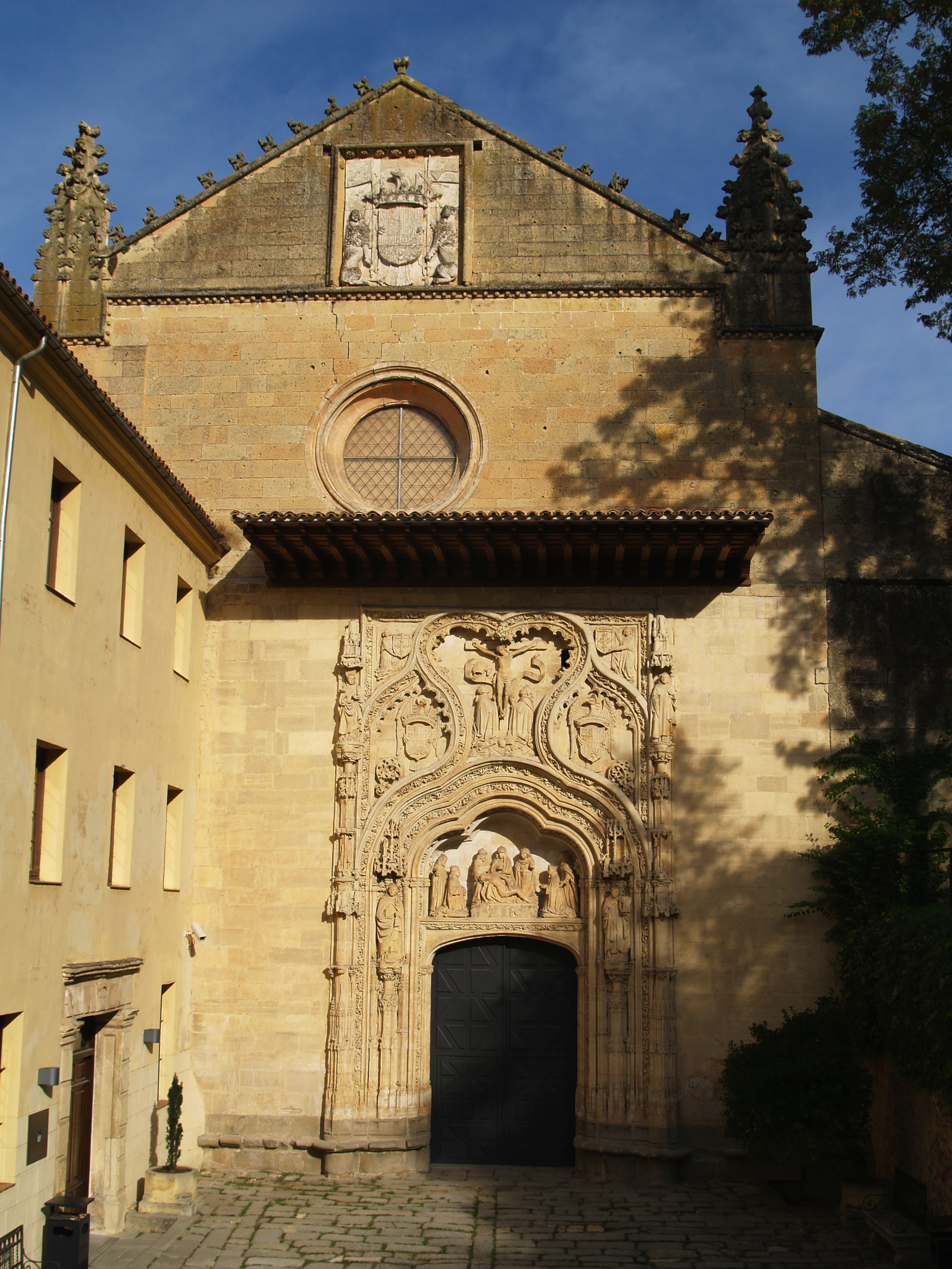 Segovia. Santa Cruz. Fachada.